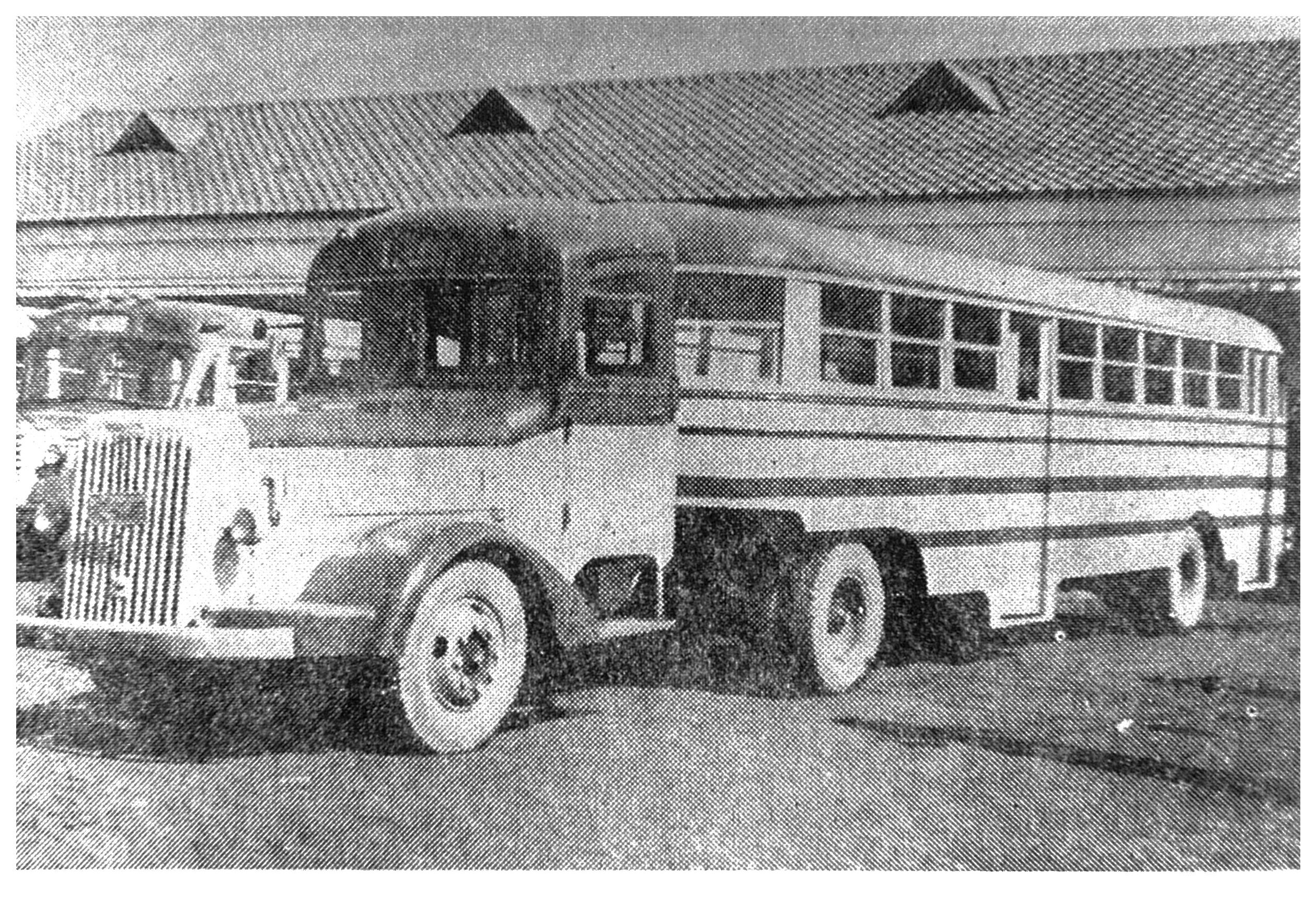 1954年ごろの熊本市営バス